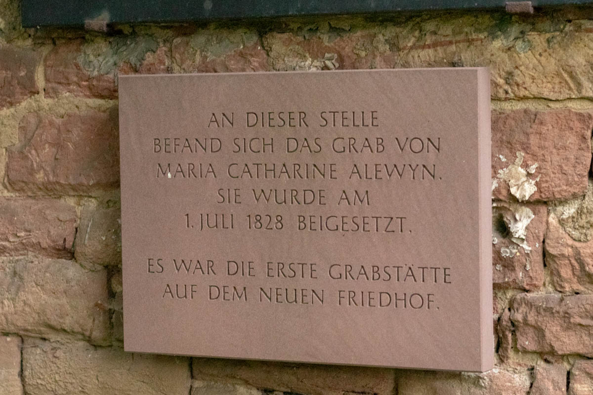 Gedenkstein für Maria Catherine Alewyn, die 1828 als erste auf dem Frankfurter Hauptfriedhof beerdigt wurde.